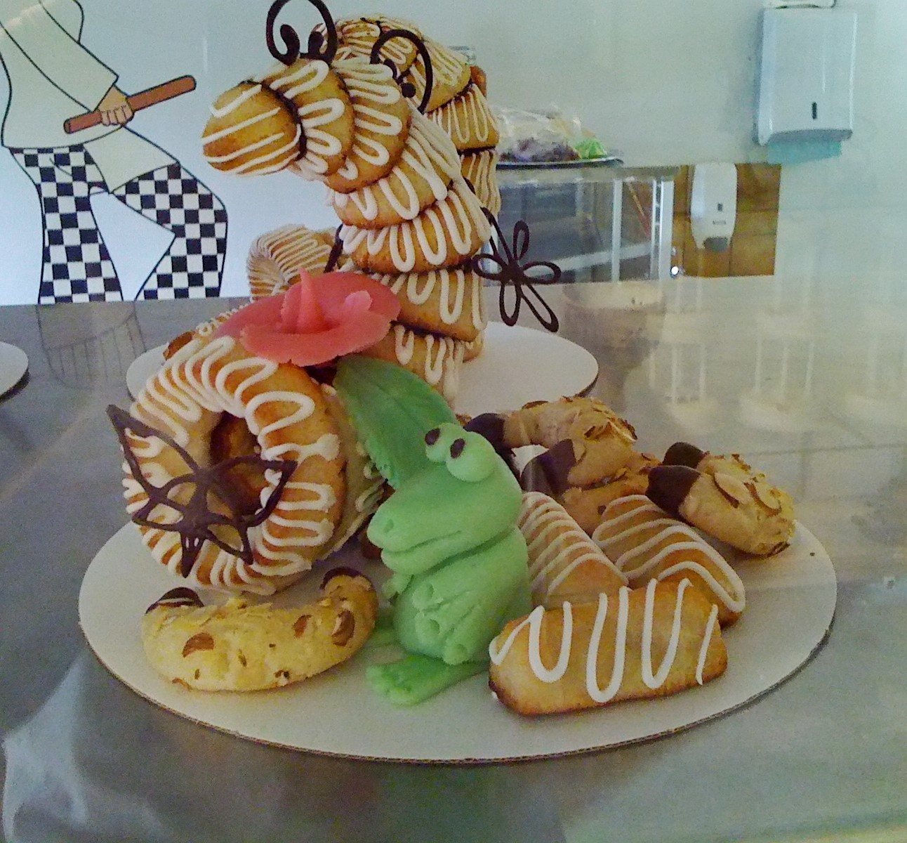 Overflødighedshorn med kransestykker, marcipan pynt og snirkler.